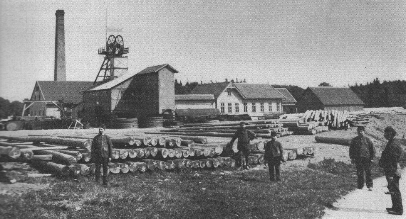 Schacht „Kaiser Wilhelm II“, Burgstätter Gangzug, um 1905